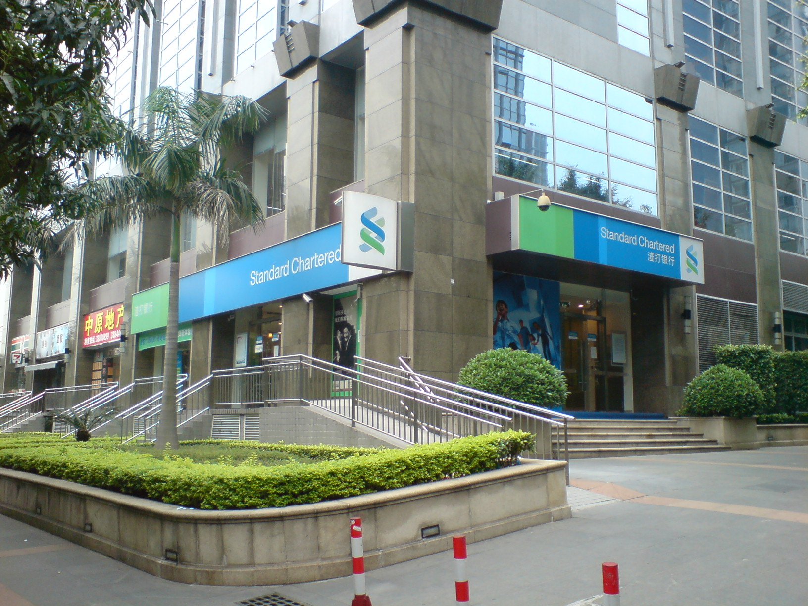 渣打银行（中国）有限公司广州分行天河支行，位于广州市天河区林和中路。